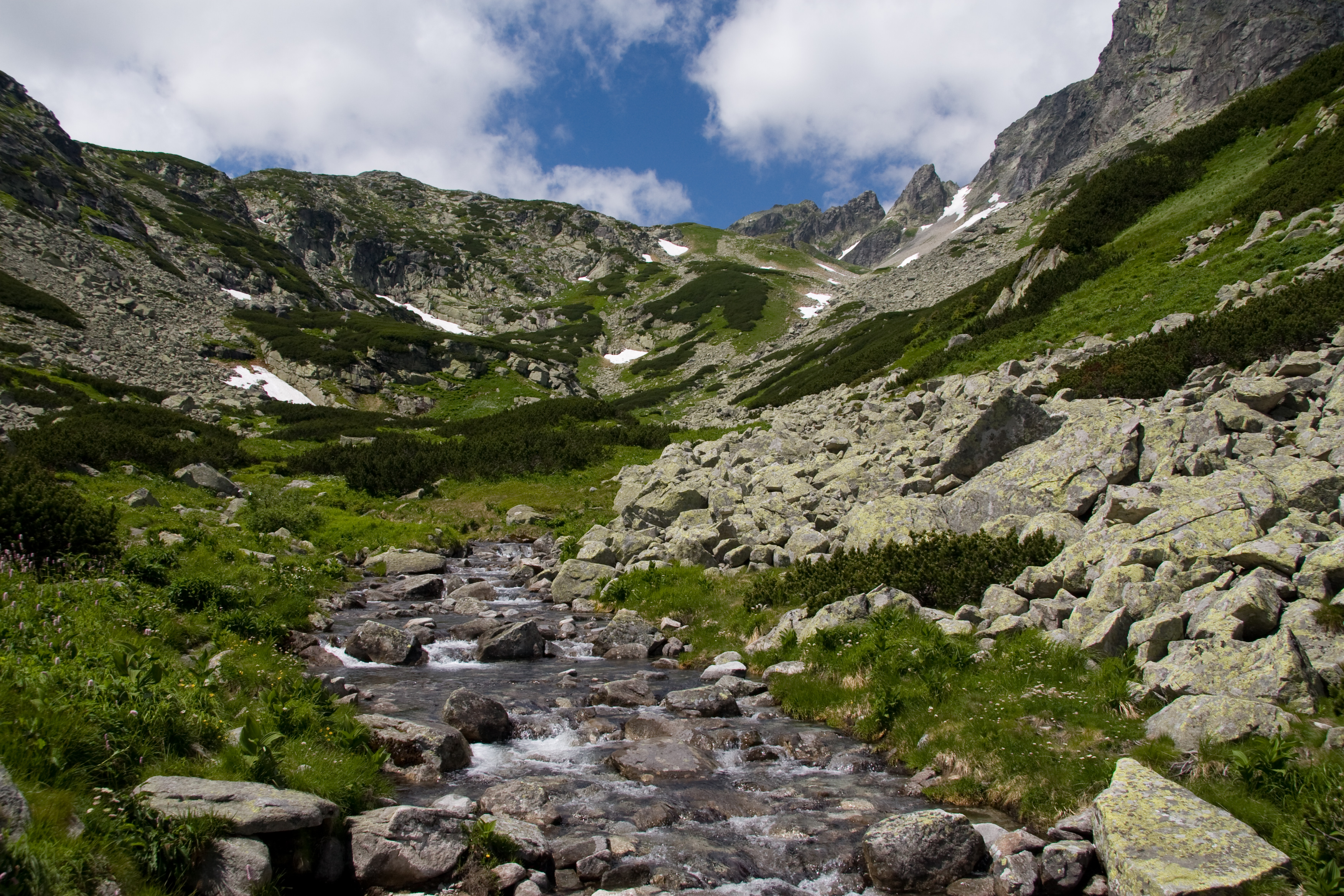 Veľká Studená dolina